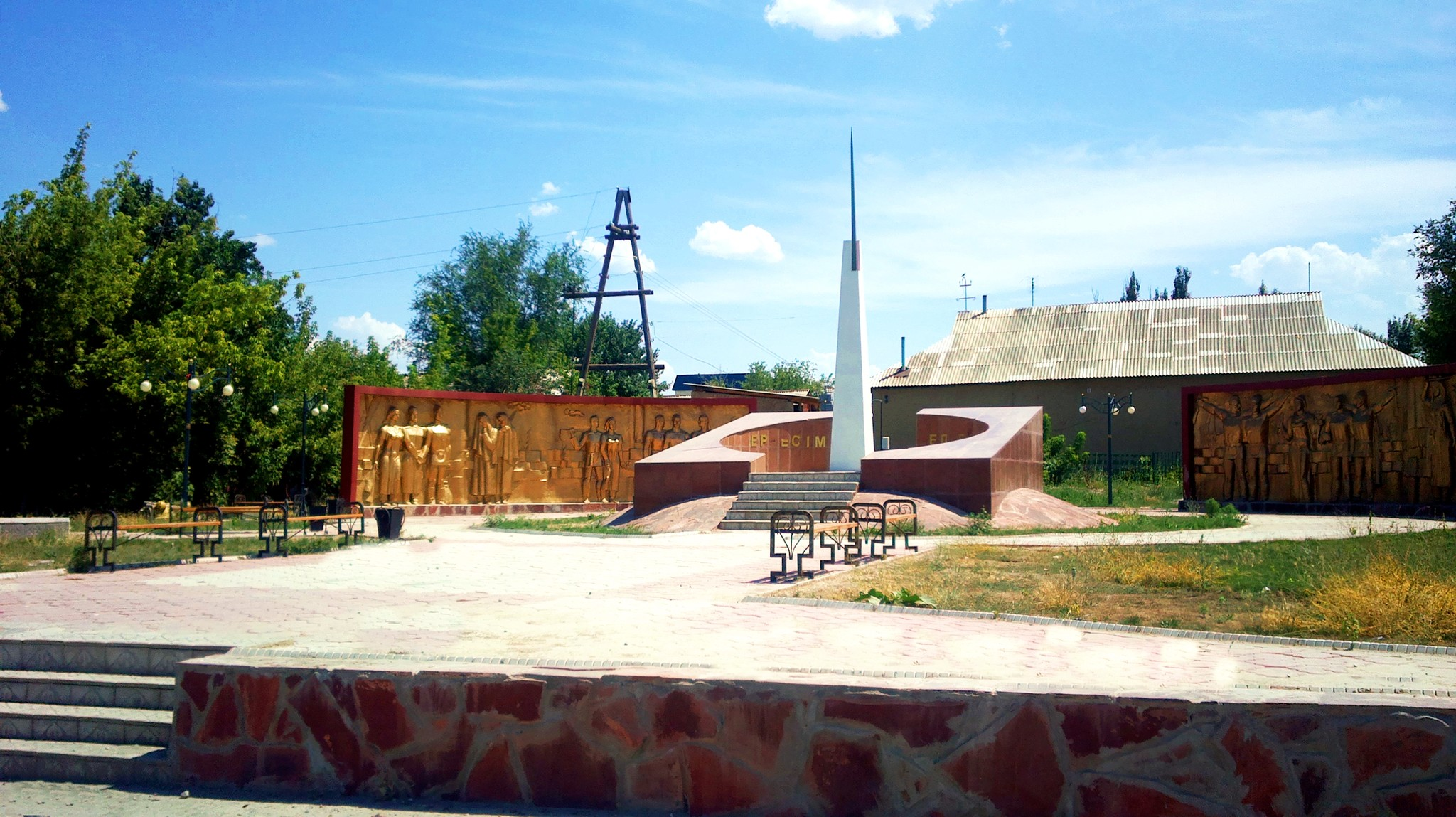 Oʻzbekcha/ўзбекча: Ziko01